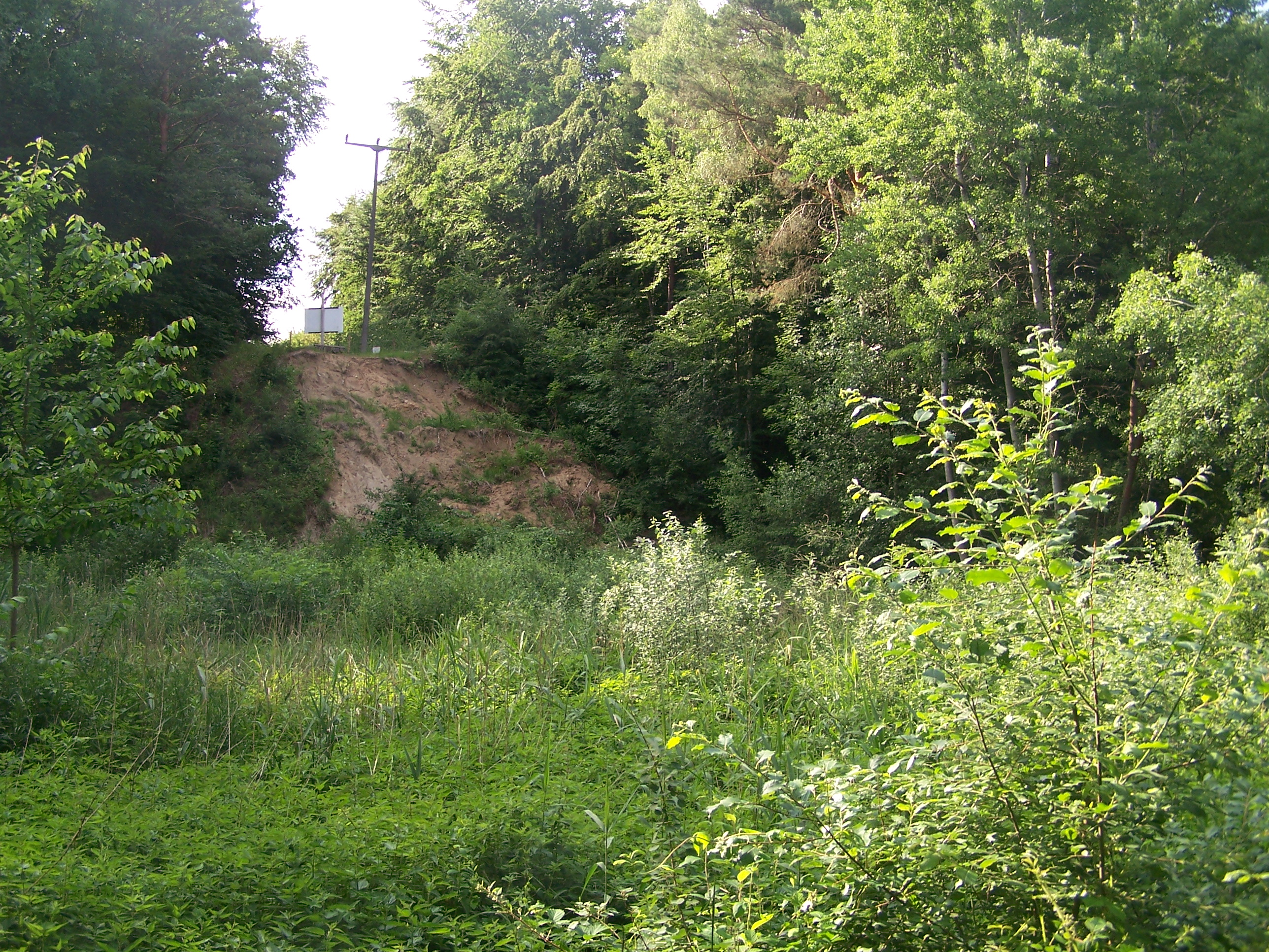 Erdrutsch in der Hellberg-Tongrube in der Nähe von Dobbertin